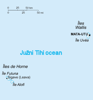 Wallis i Futuna, karta